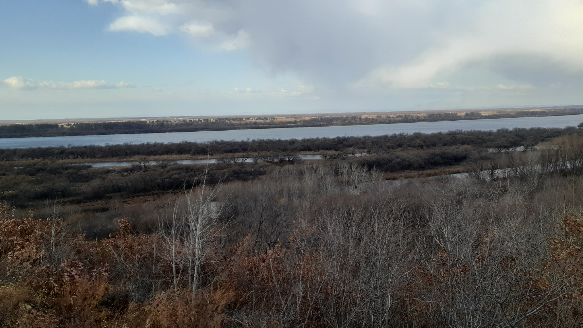 Речная граница с КНР, сопка Половинка.